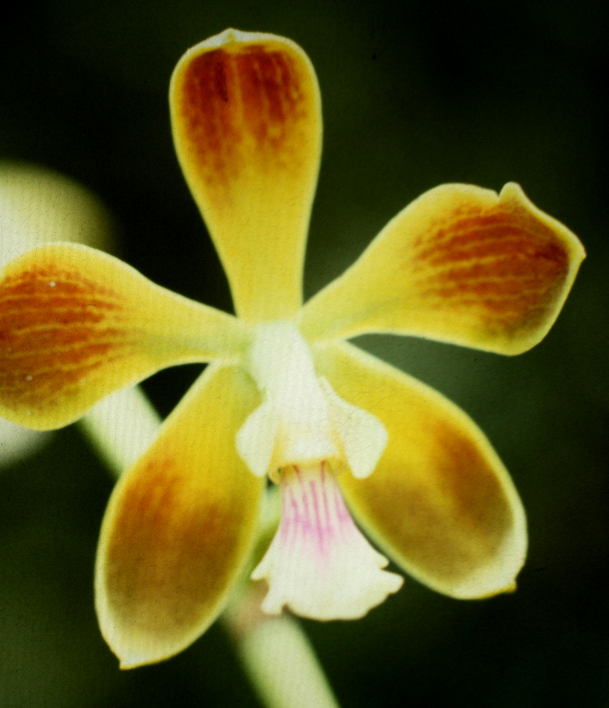 Encyclia diurna, Suriname.